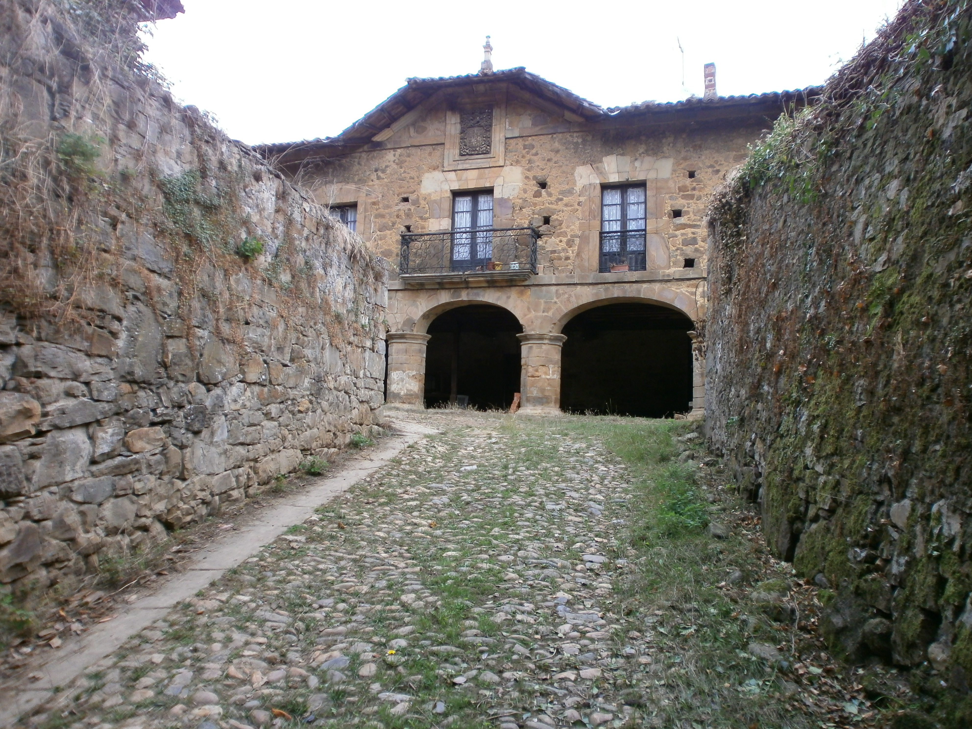 Palacio del Valletu